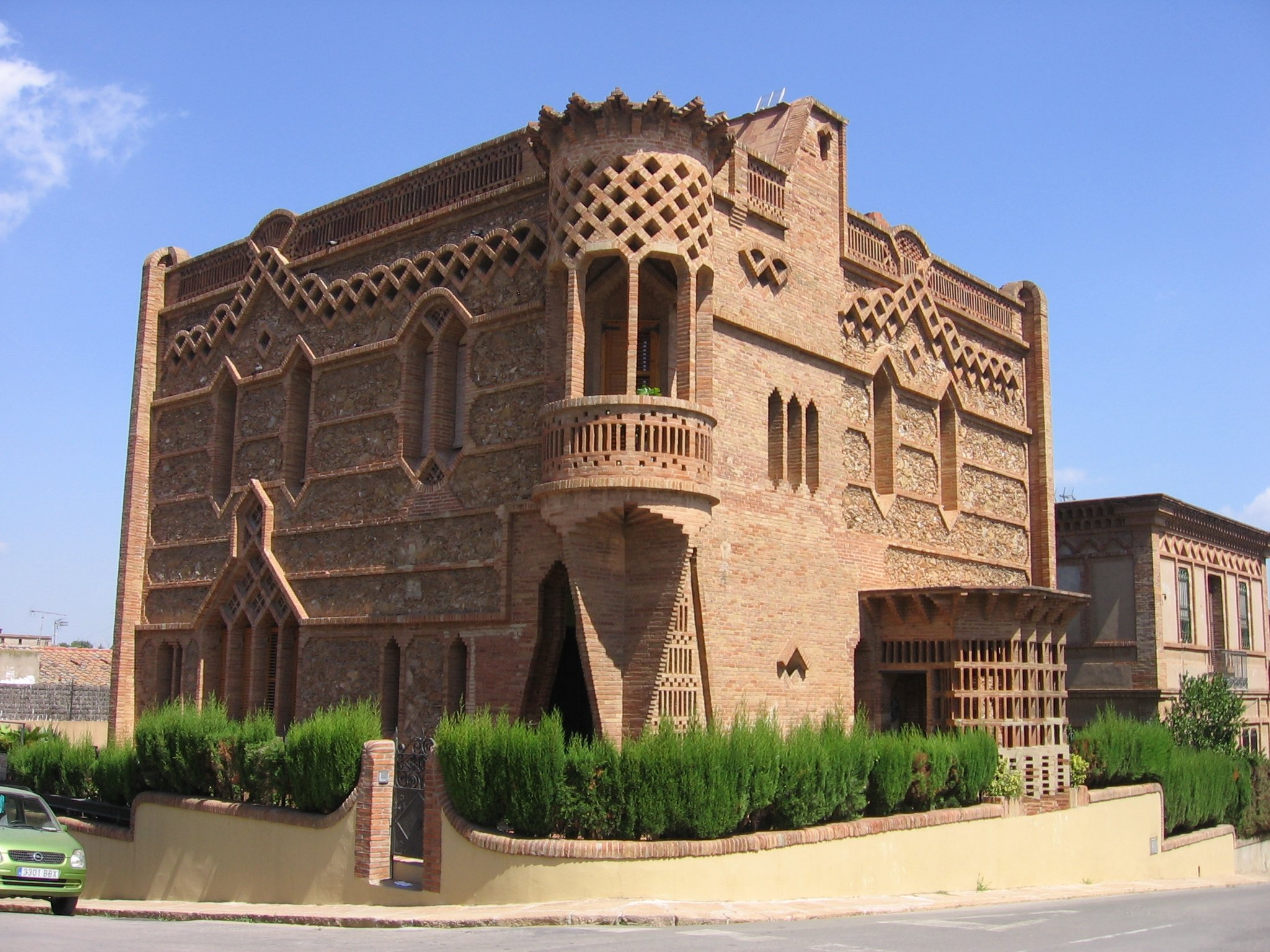 Ca l'Espinal, en la Colonia Güell (Santa Coloma de Cervelló, Barcelona), de Joan Rubió (1900)